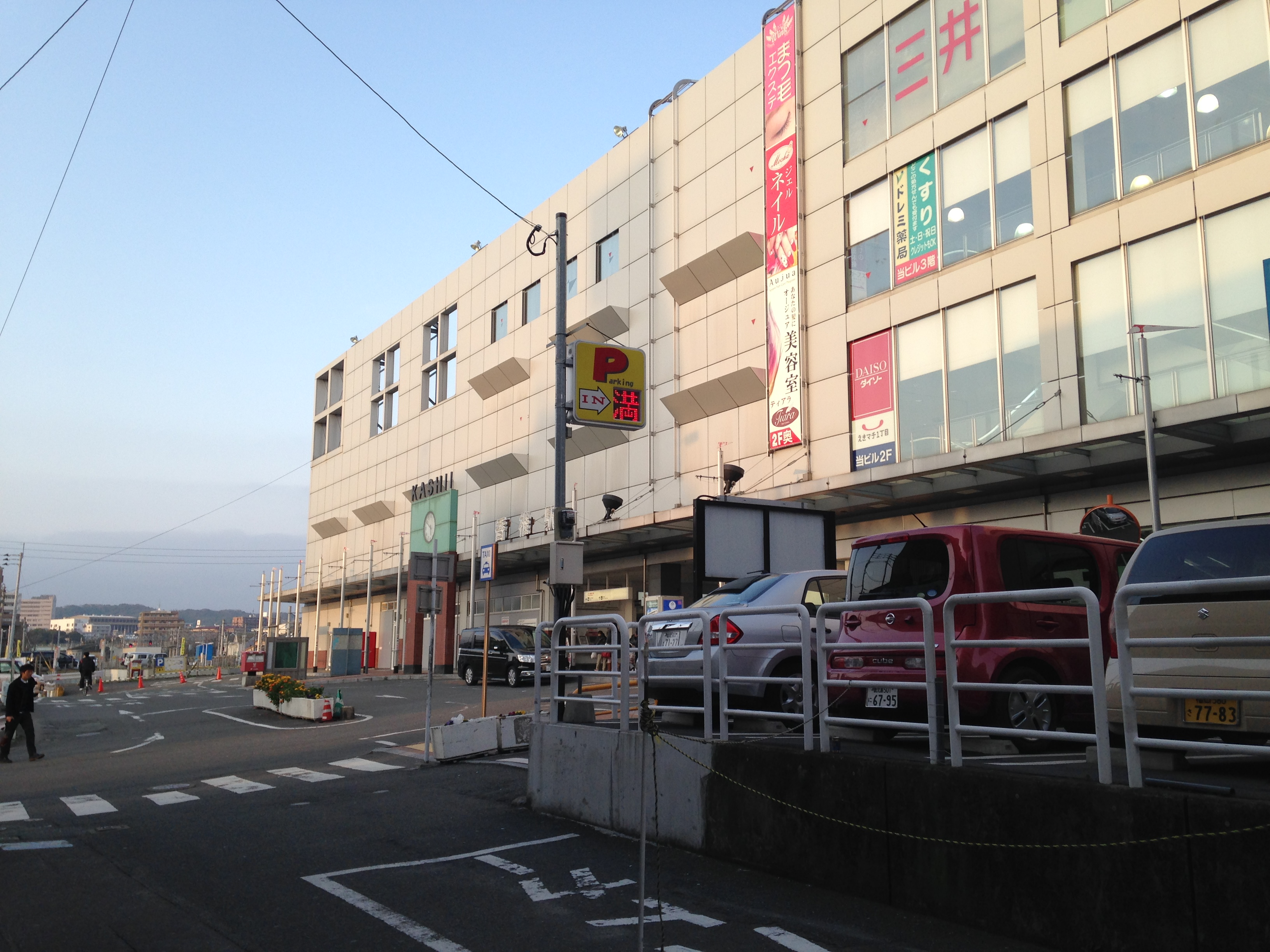 香椎駅駅舎